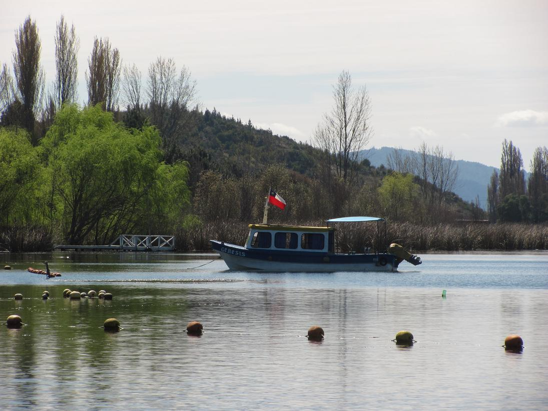 Vista Panorámica de la "Laguna Avendaño"